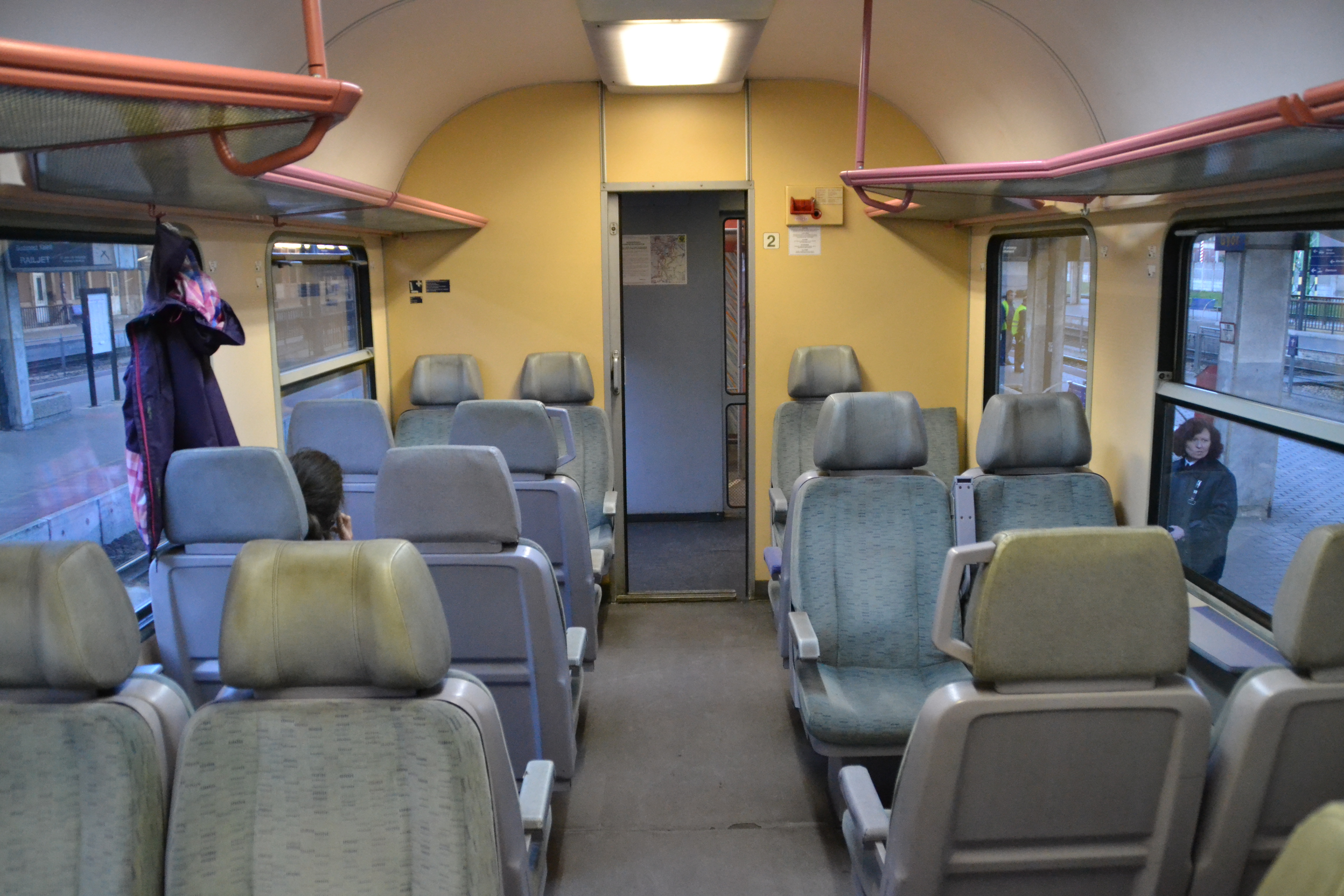 2. osztályú Halberstadti kocsi belseje